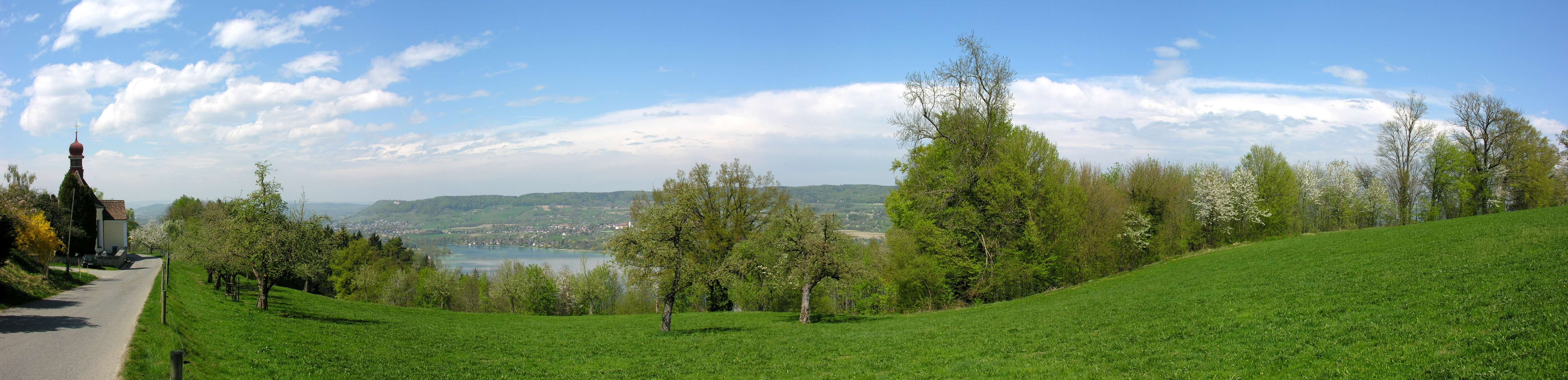 Switzerland, Thurgau, Klingenzell